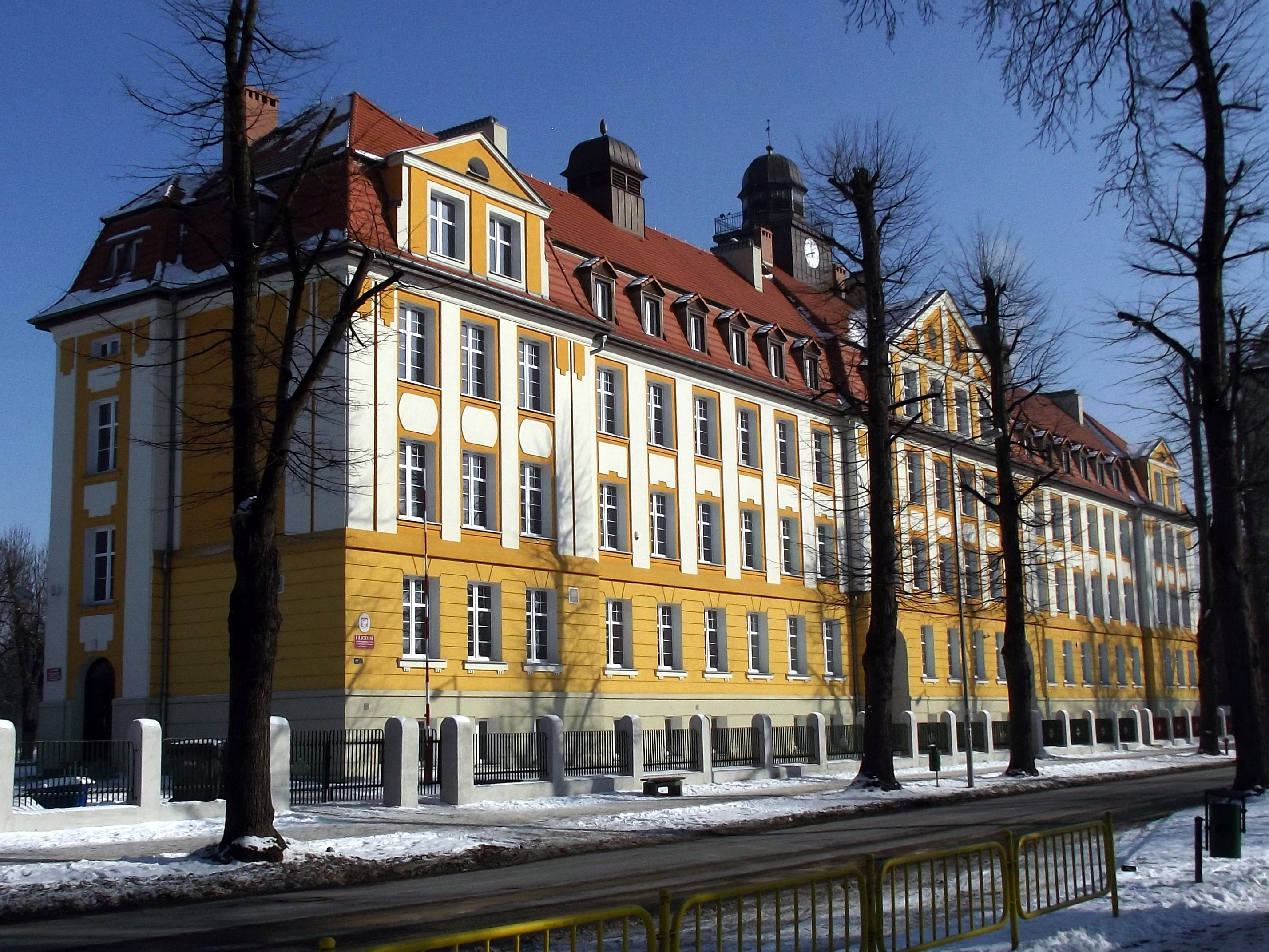 Budynek Liceum Ogólnokształcącego i Gimnazjum nr 1 w Międzyrzeczu, projekt Zillmannów